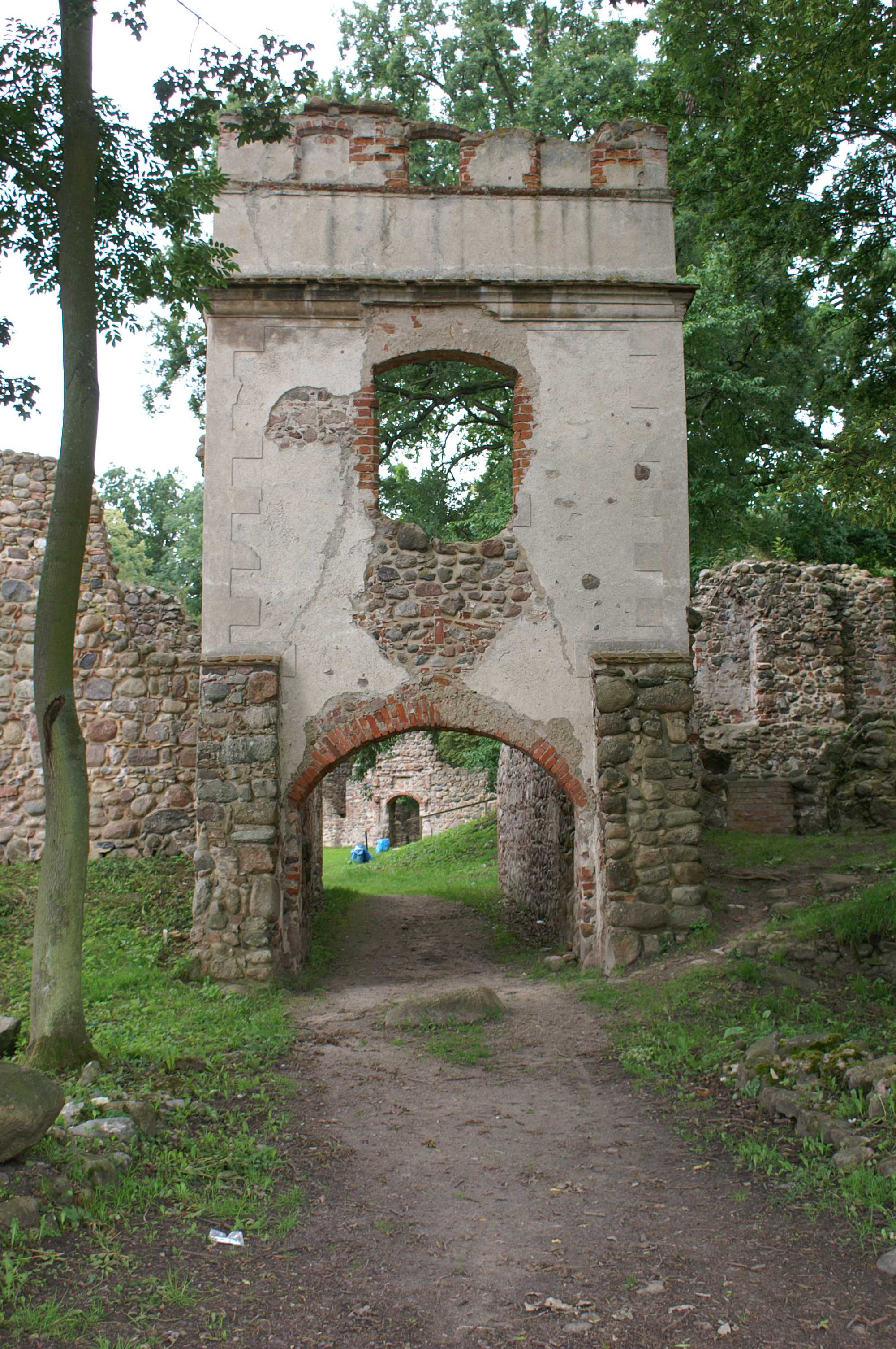 Burgruine Landskron - Landkreis Ostvorpommern - Torhaus von Norden